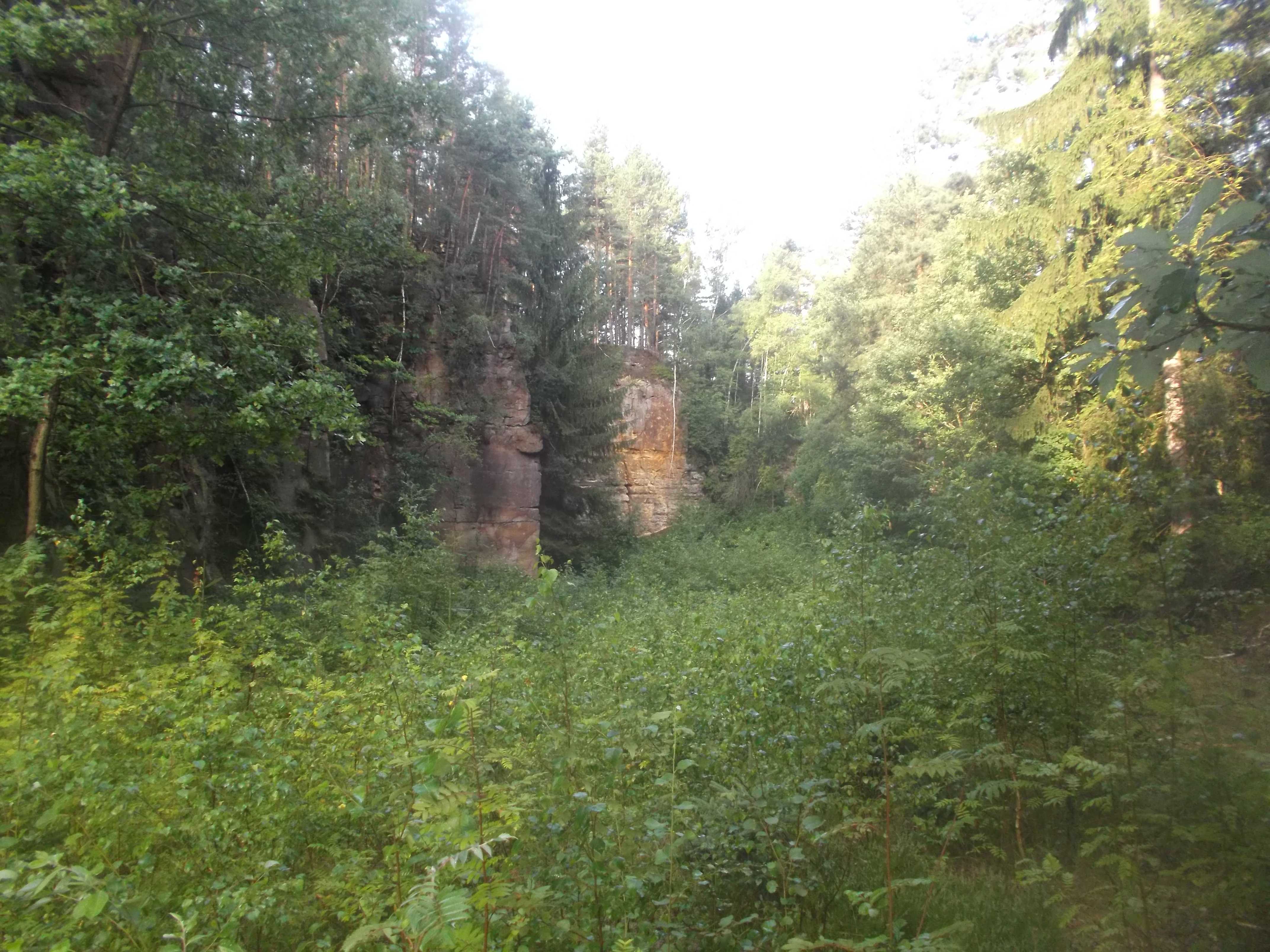 Steinbruch am Sand-Berg